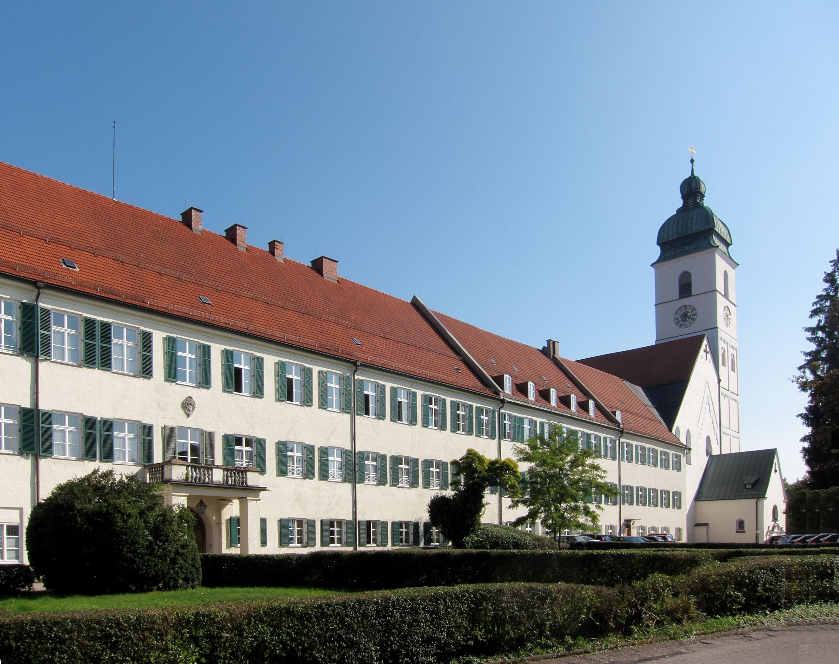 Schlossplatz 1 - 3, Sog. Residenz, jetzt Finanzamt, dreigeschossiger, an die Kirche anschließener Trakt, 1666 durch Michael Beer und Johann Moosprugger als Jesuitenkolleg auf der Grundlage des mittelalterlichen Benediktinerklosters erbaut, erneuert nach Brand von 1780 und im 19. Jh. (D-1-75-115-40)